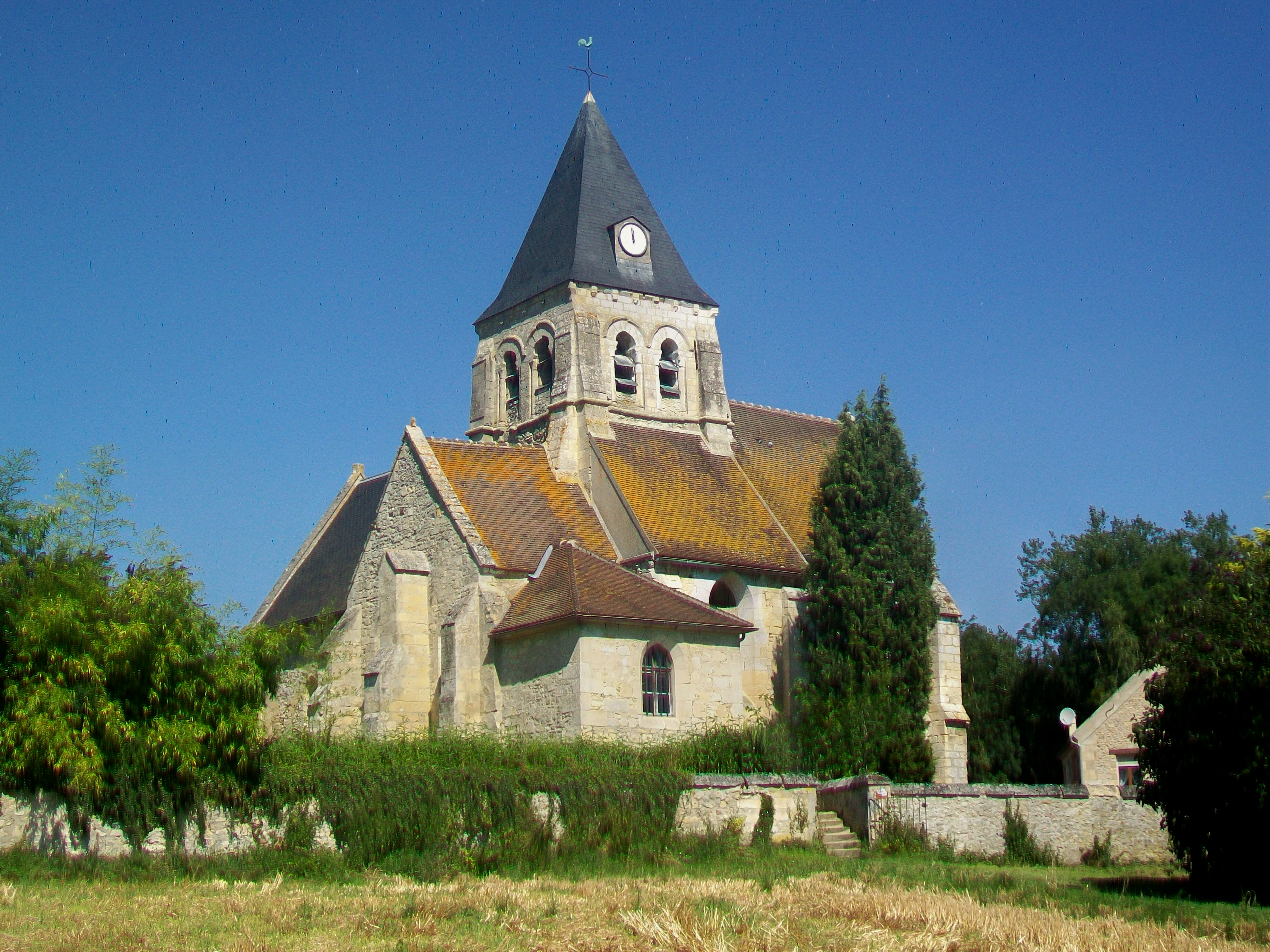 Vue sur l'église depuis le sud-est.